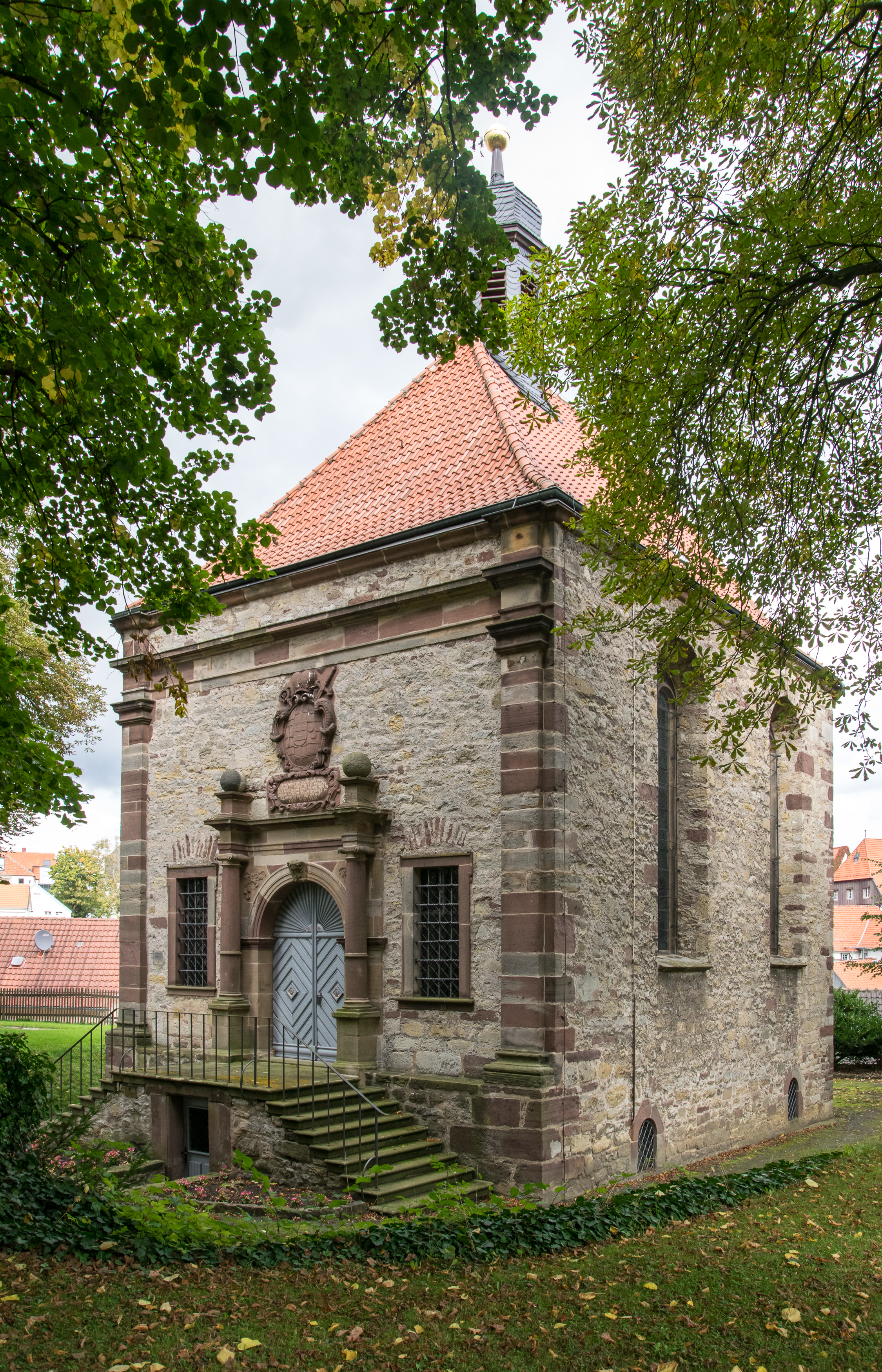 Erasmuskapelle von 1681 auf dem Wartberch in Warburg